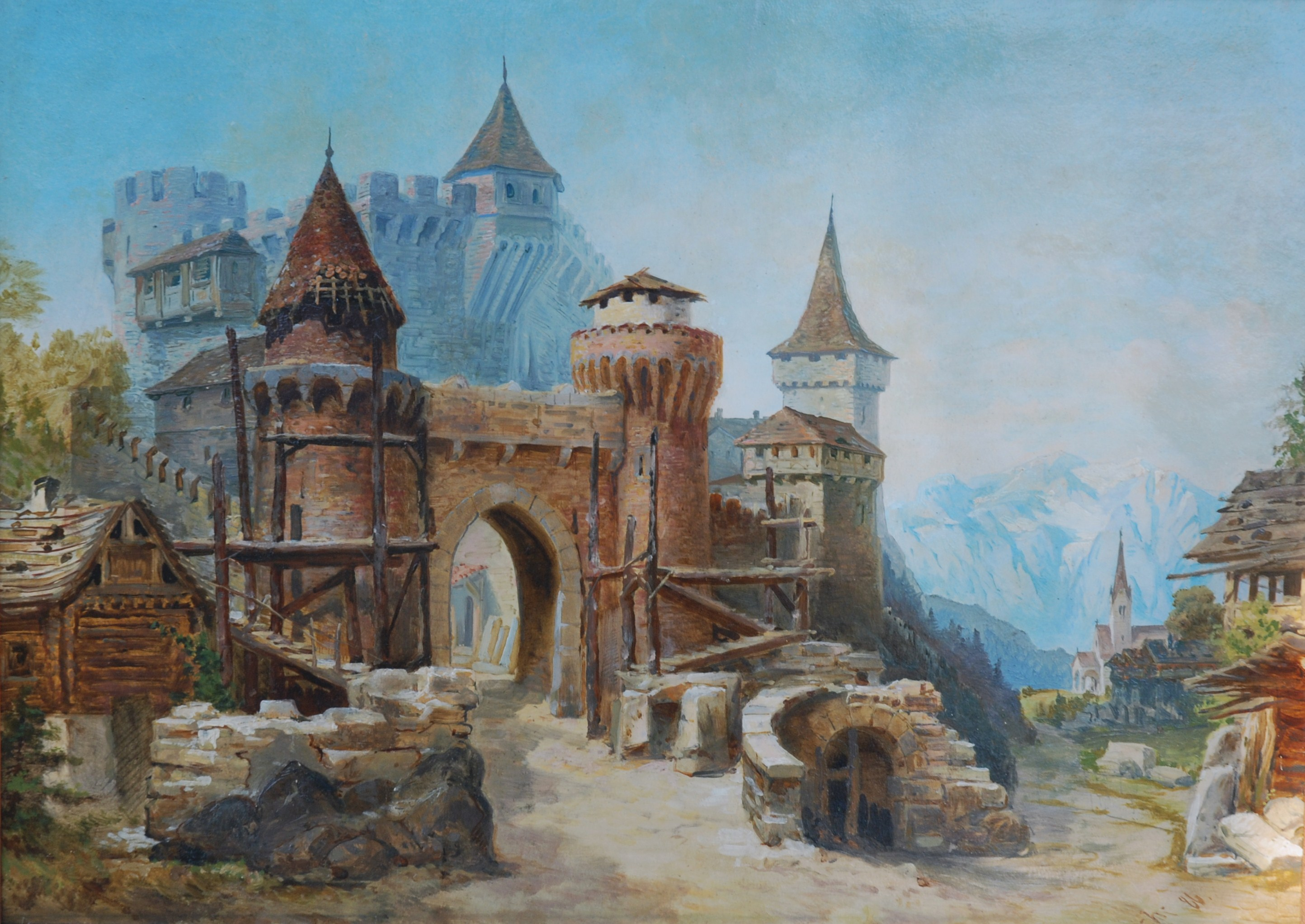 Carlo Brioschi: "Alte Burg in Voralpenlandschaft", Öl auf Papier, signiert, datiert 1886